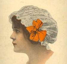 "Curse of an Aching Heart", 1913 sheet music cover